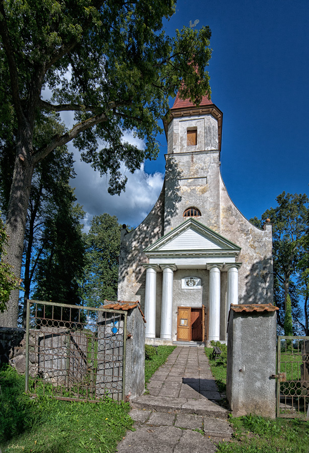 Rubenes luterāņu baznīca ar žogu, Rubene